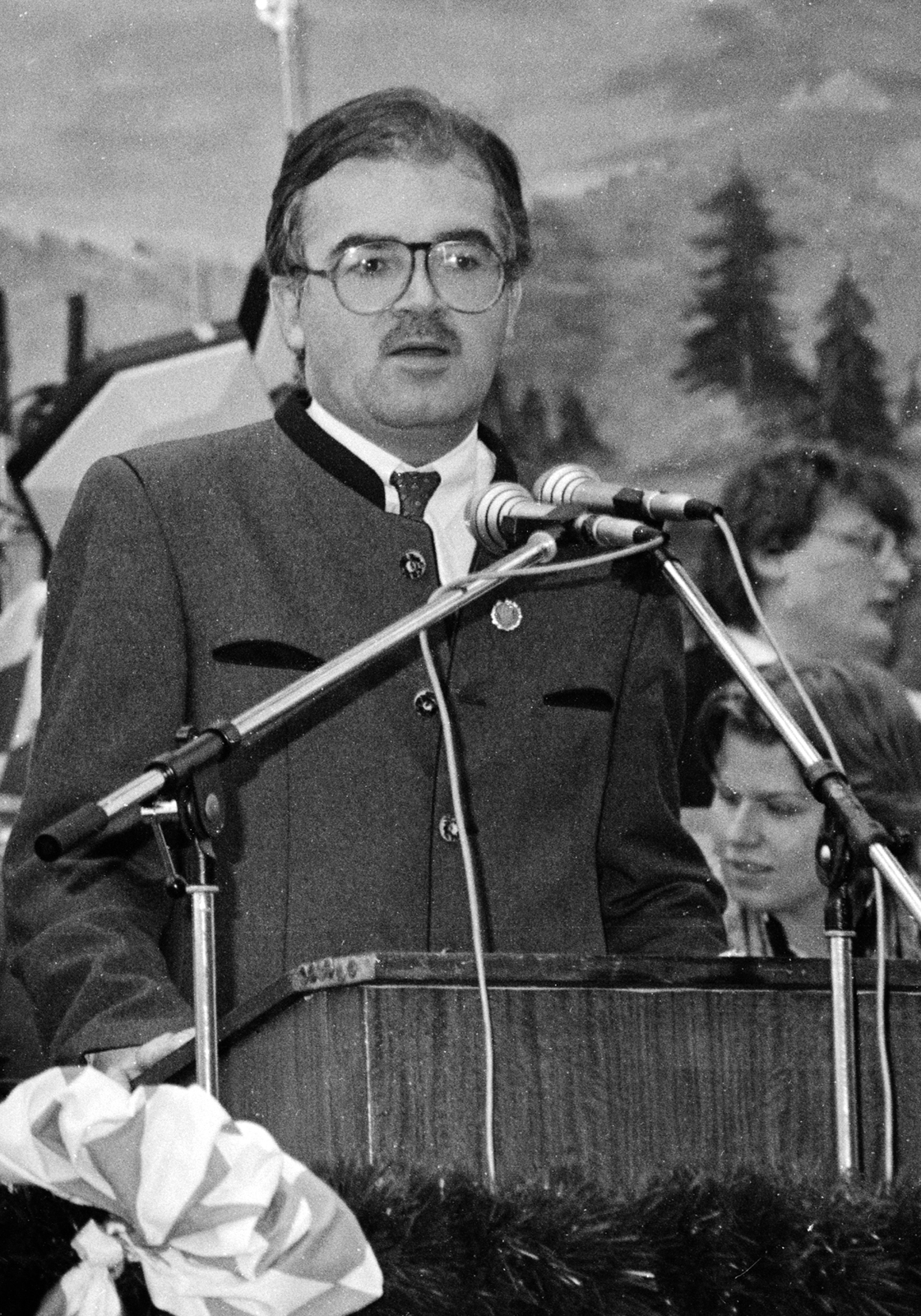 Peter Gauweiler, deutscher Politiker (CSU). Hier am 5. April 1987 in München-Fürstenried